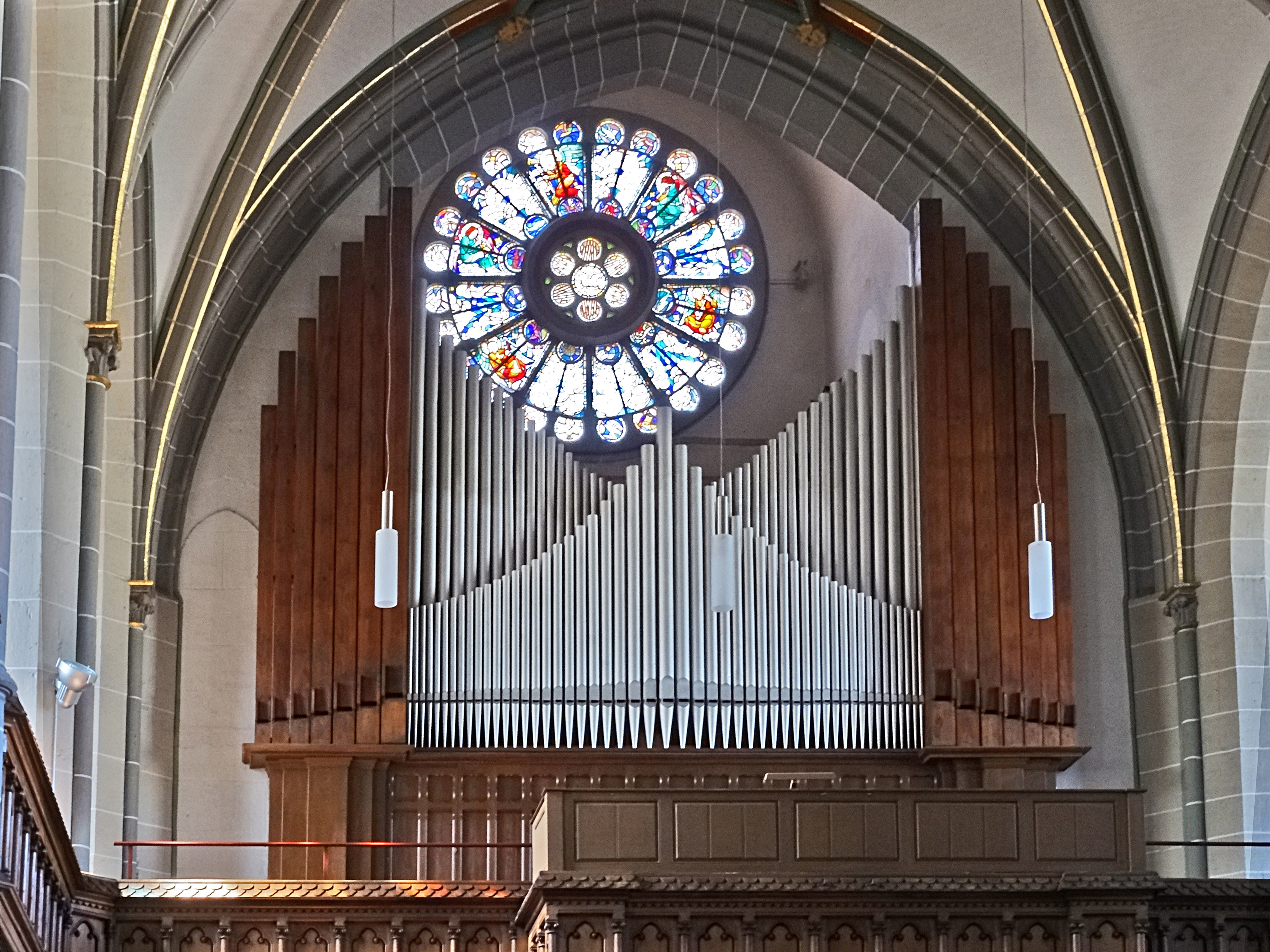 Die Meininger Reger-Orgel von Martin Josef Schlimbach (1889) in der Stadtkirche Meiningen